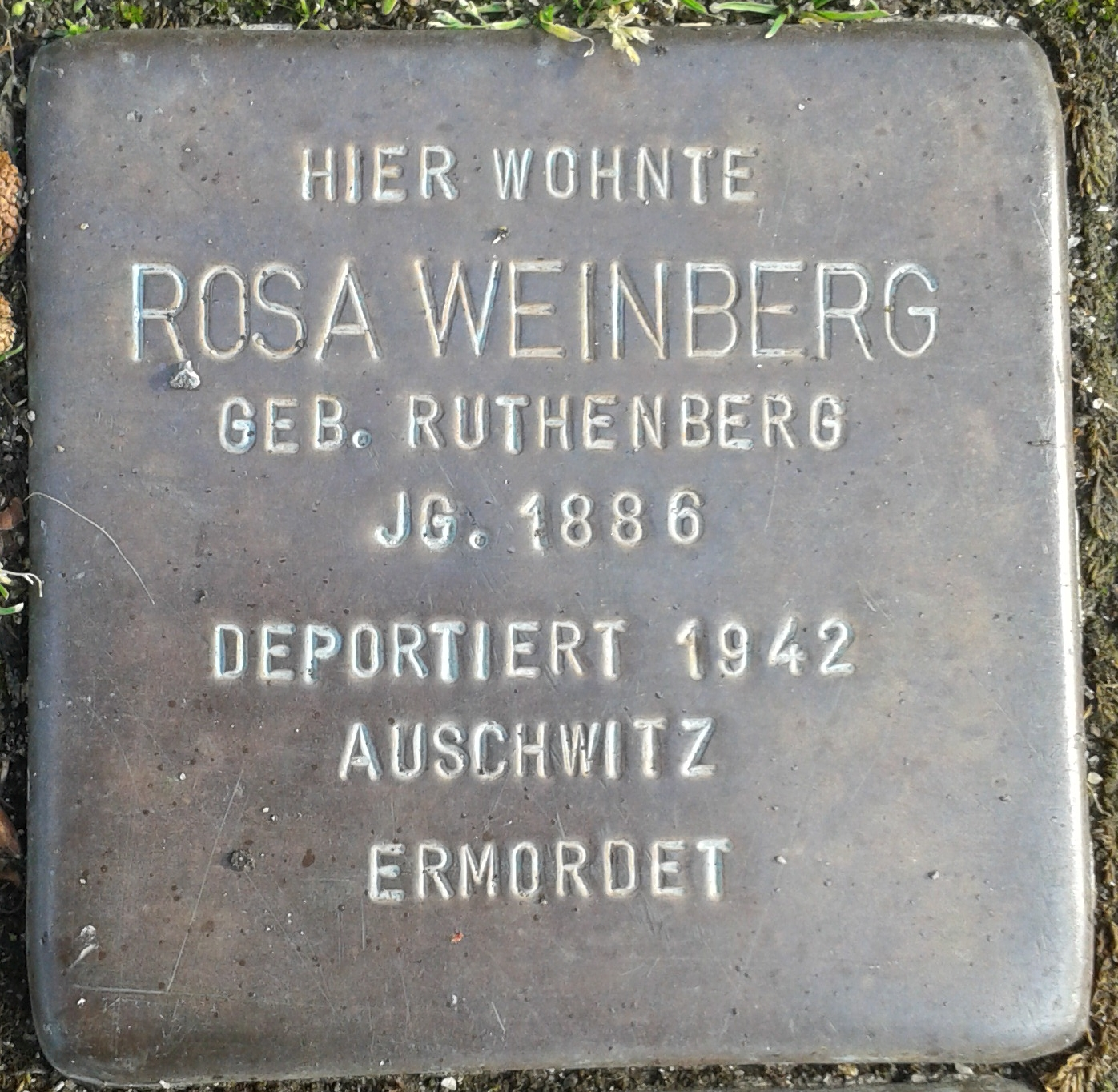 Stolperstein Selm Bahnhofstraße 37 Rosa Weinberg